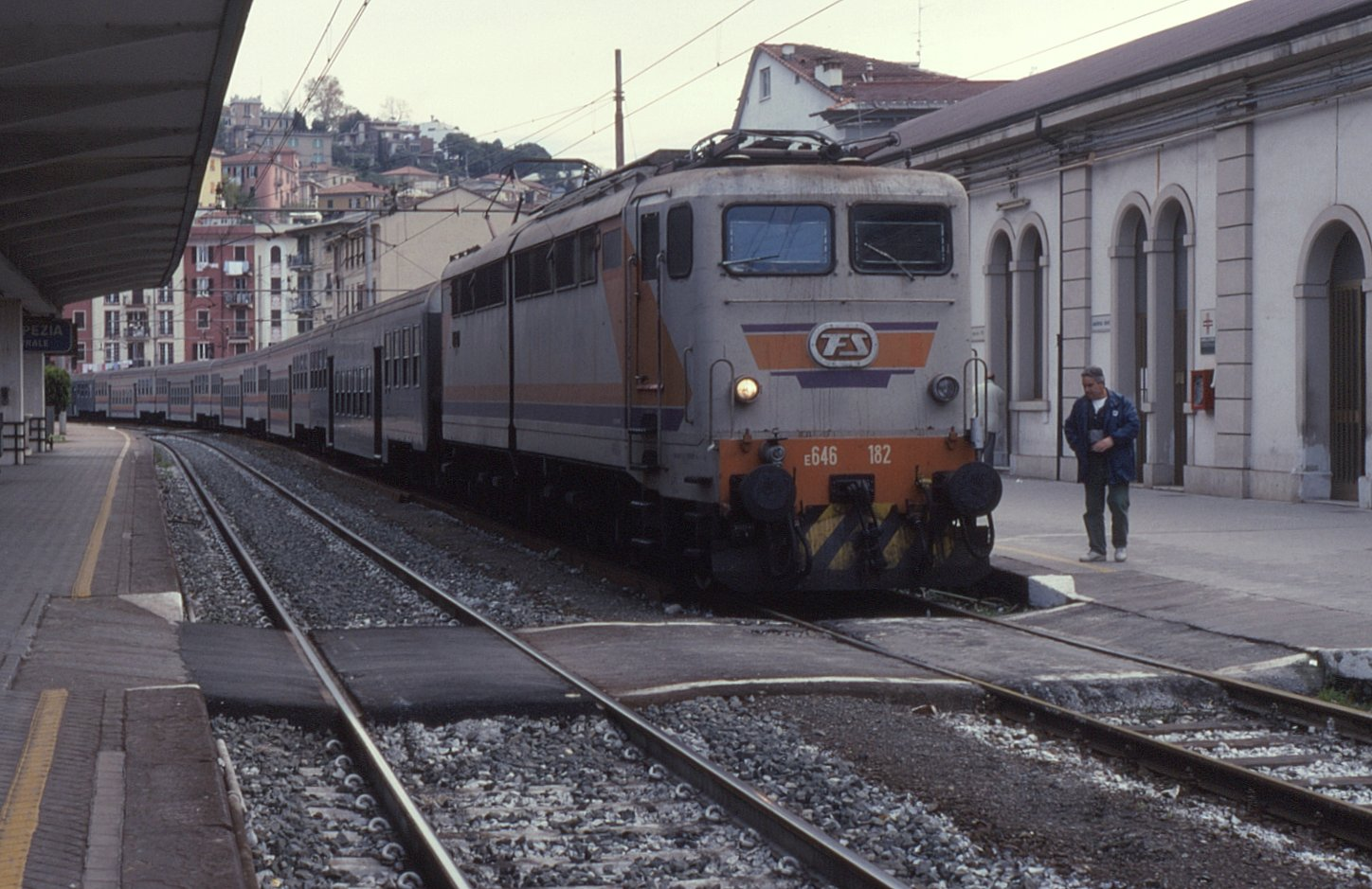 Locomotiva E.646.182 delle Ferrovie dello Stato in testa a un treno in arrivo alla Spezia Centrale